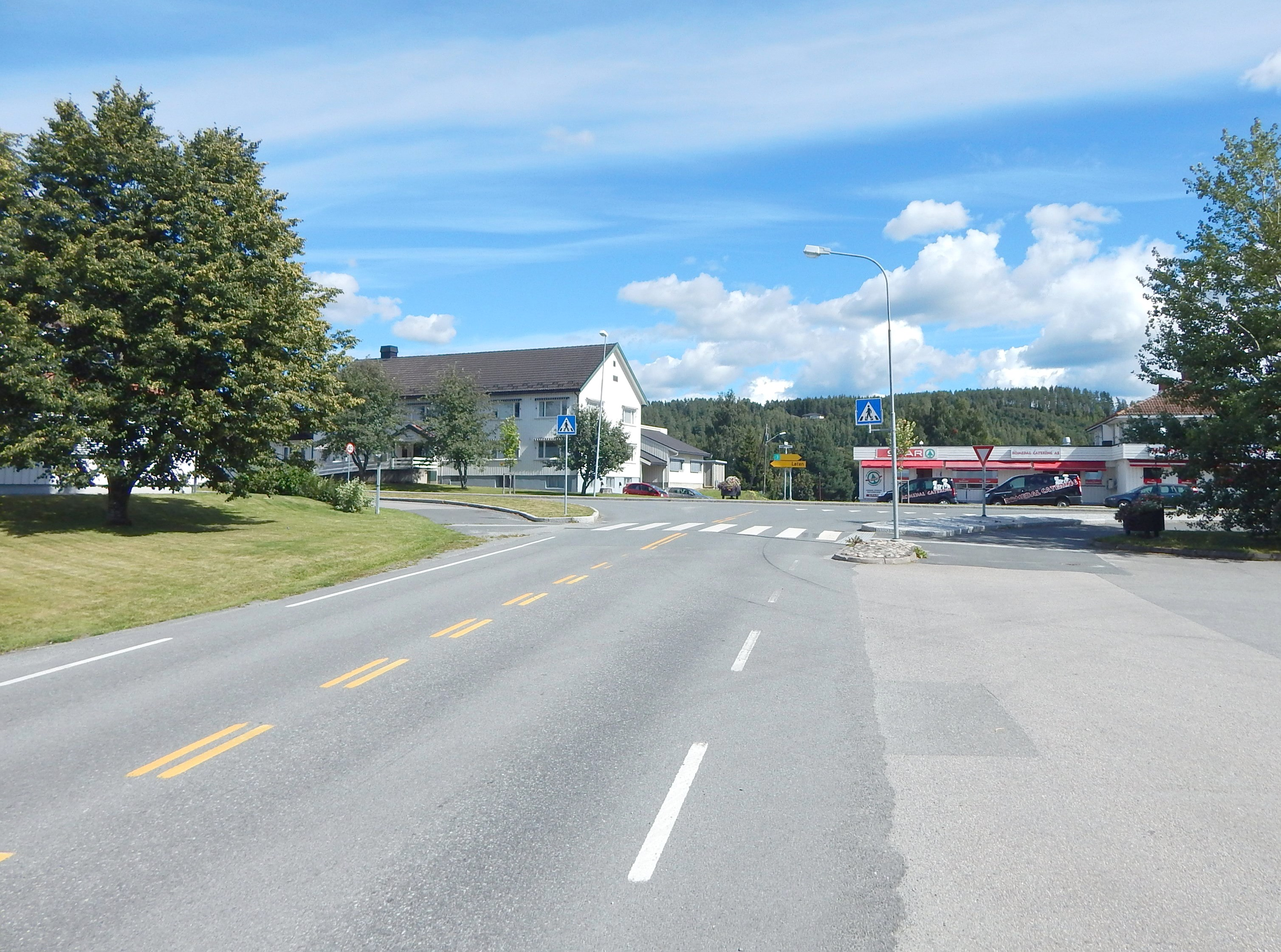 Solvinvegen (fylkesvei 1914, tidl. 238) inn mot Romedal sentrum